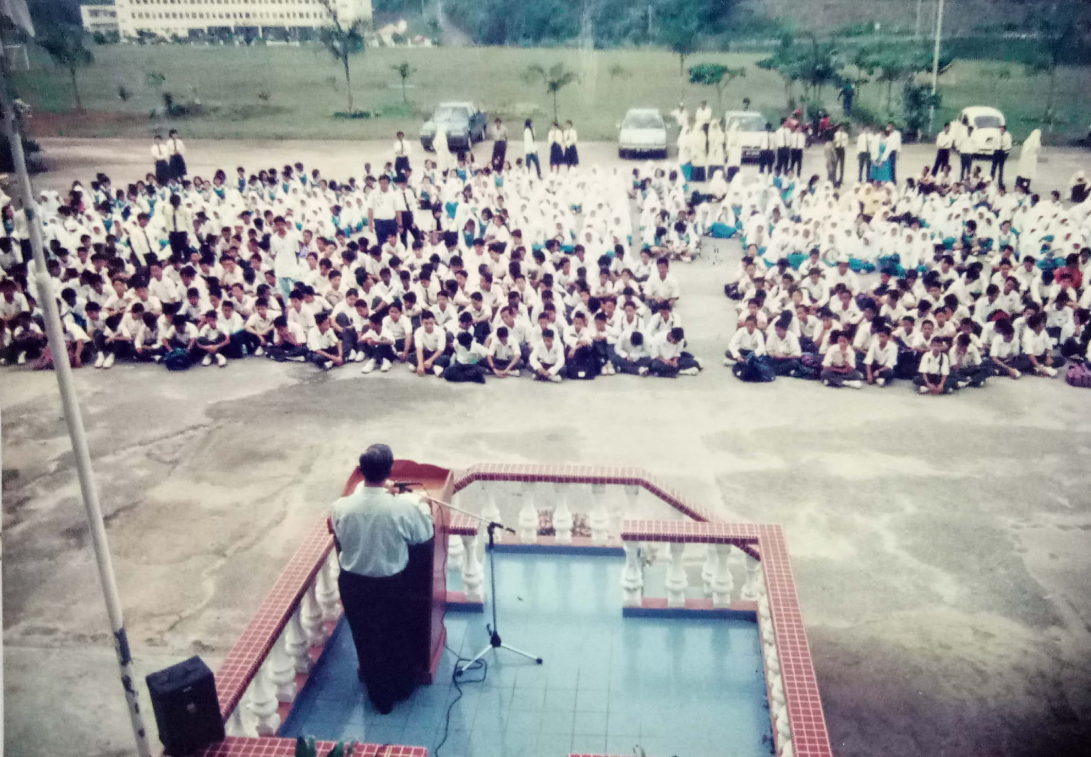 Jumlah Pelajar